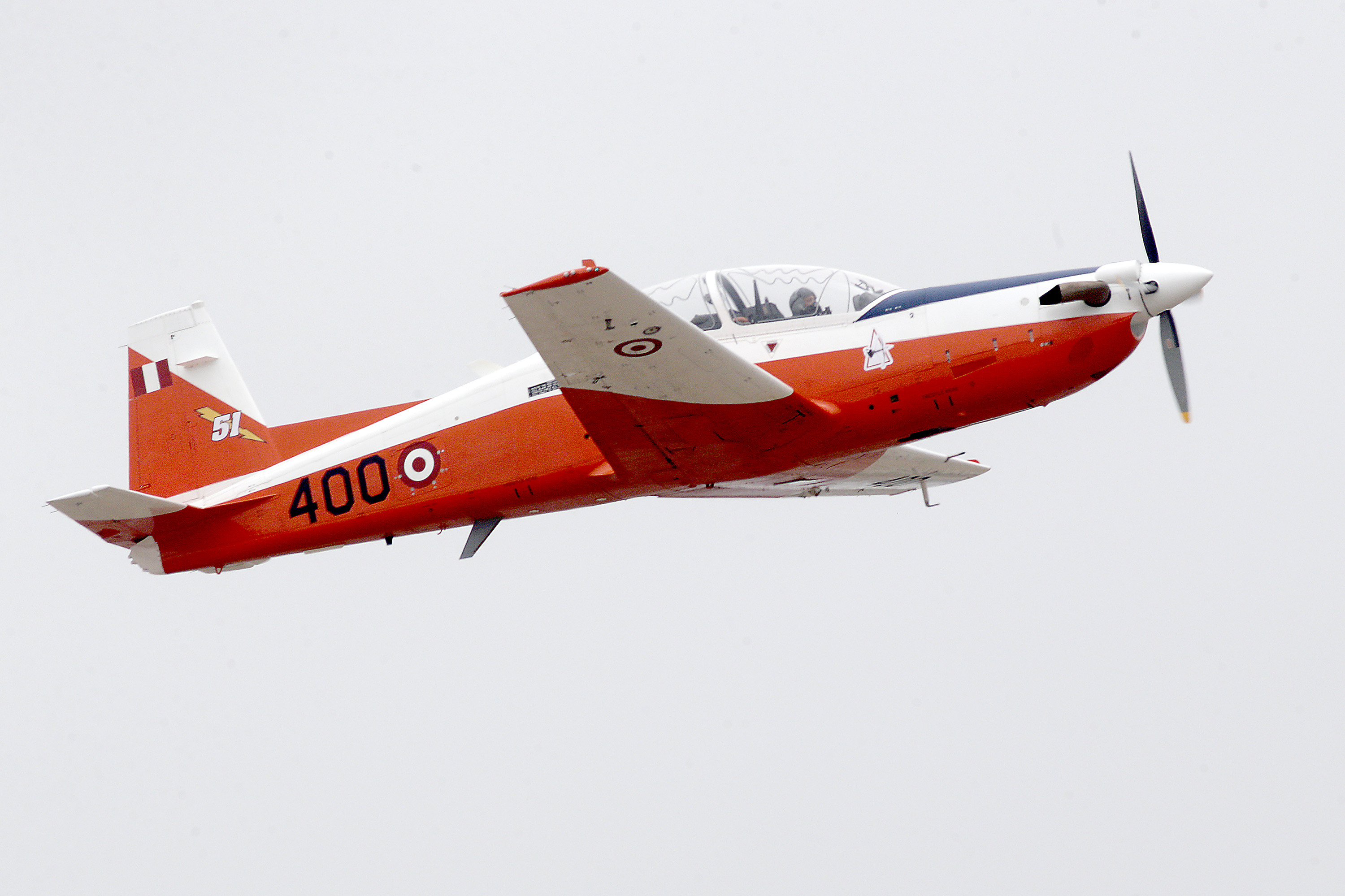 El ministro de Defensa, Pedro Cateriano, participó junto al Presidente Ollanta Humala en la presentación y primer vuelo de los dos primeros aviones de instrucción básica KT-1P, producto de la alianza estratégica entre Perú y Corea.